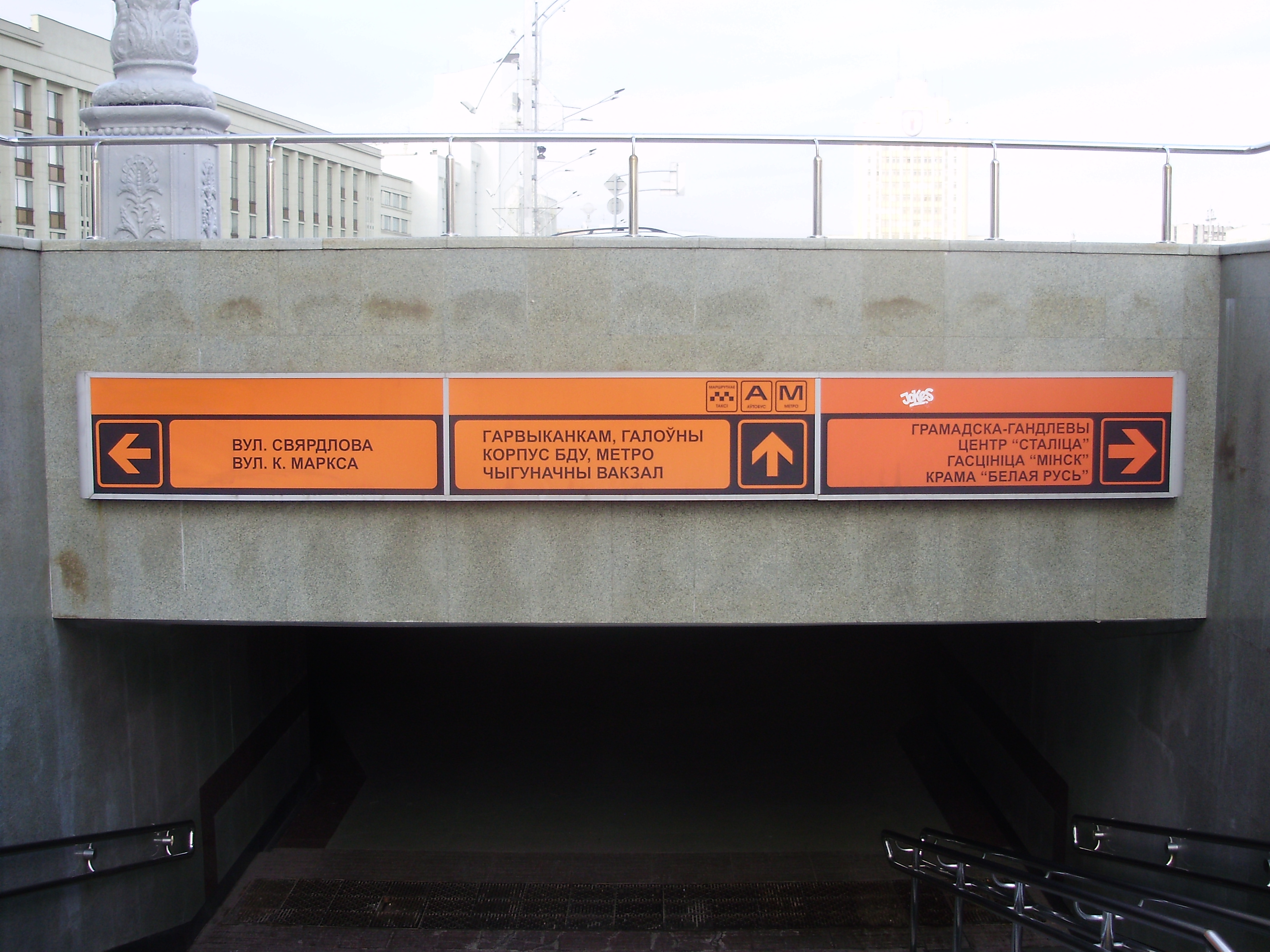 Беларуская (тарашкевіца): Шыльда ў менскім мэтро.